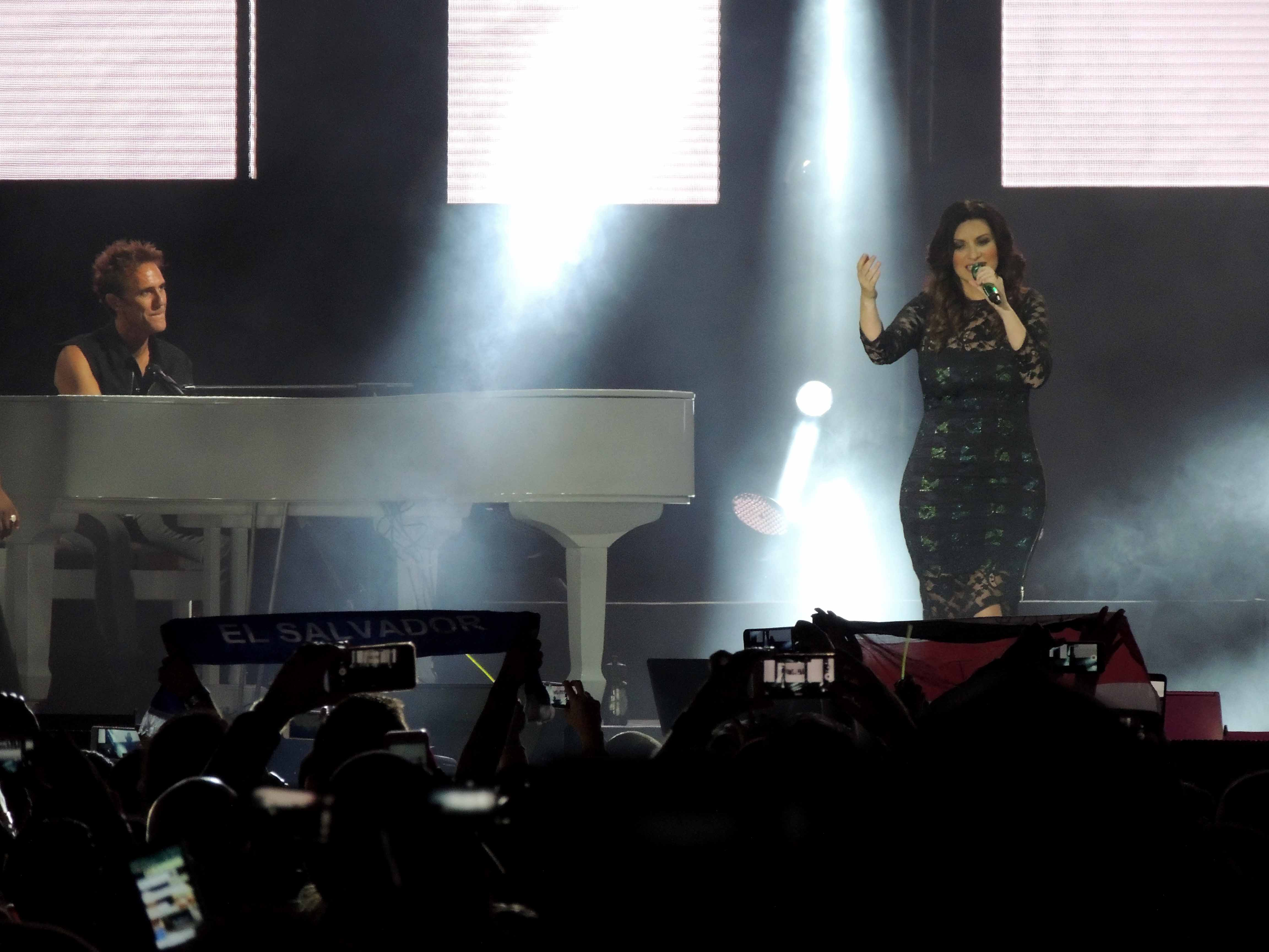 La cantante Italia Laura Pausini en el Estadio Nacional de Costa Rica, el sábado 20 de agosto de 2016